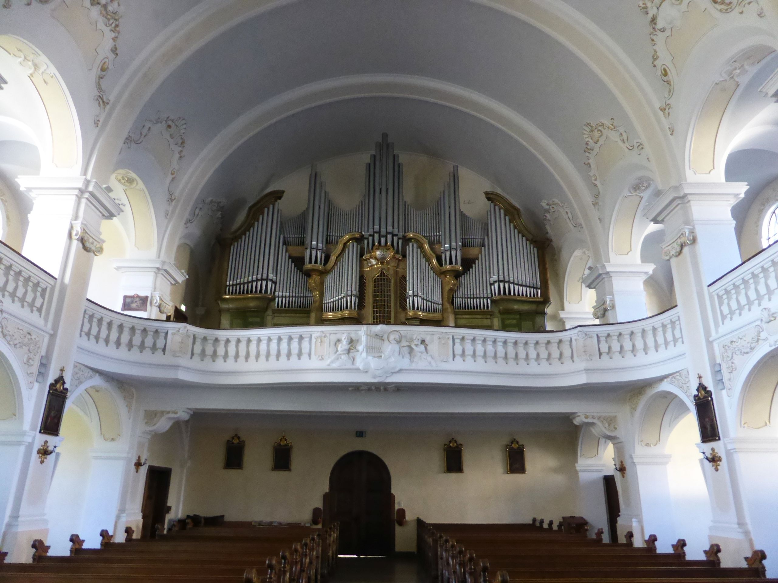 Kreuzbergkirche Bischofshofen